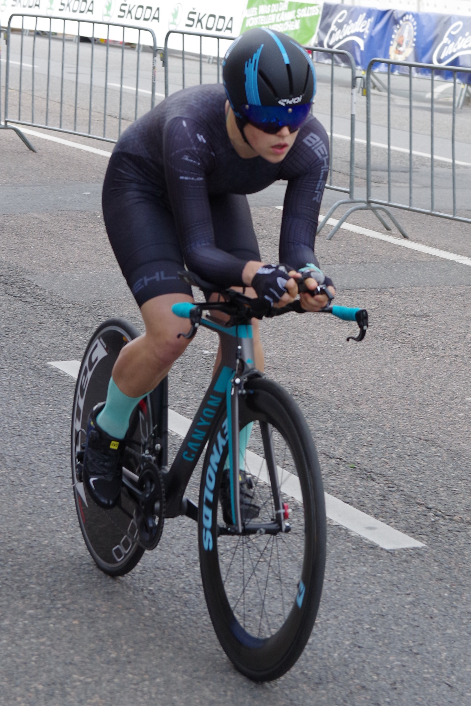 Deutsche Meisterschaften im Einzelzeitfahren 2017 23. Juni 2017 The making of this document was supported by the Community-Budget of Wikimedia Germany.